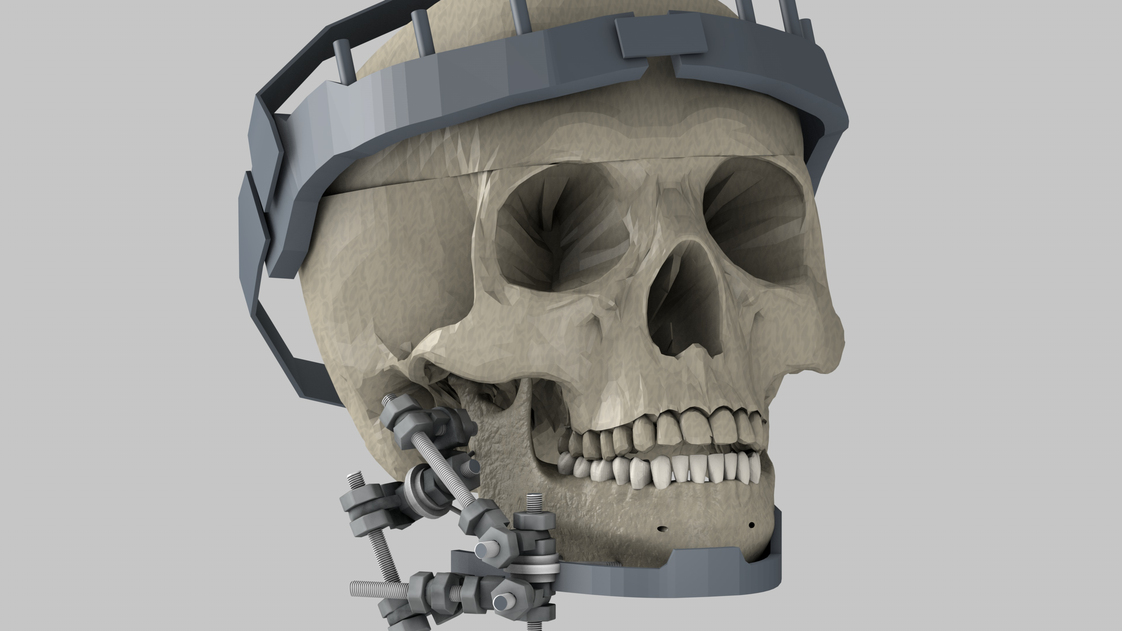 "ЭкзоЧел" - комплексное решение, направленное на оптимизацию лечения пациентов с переломами нижней челюсти